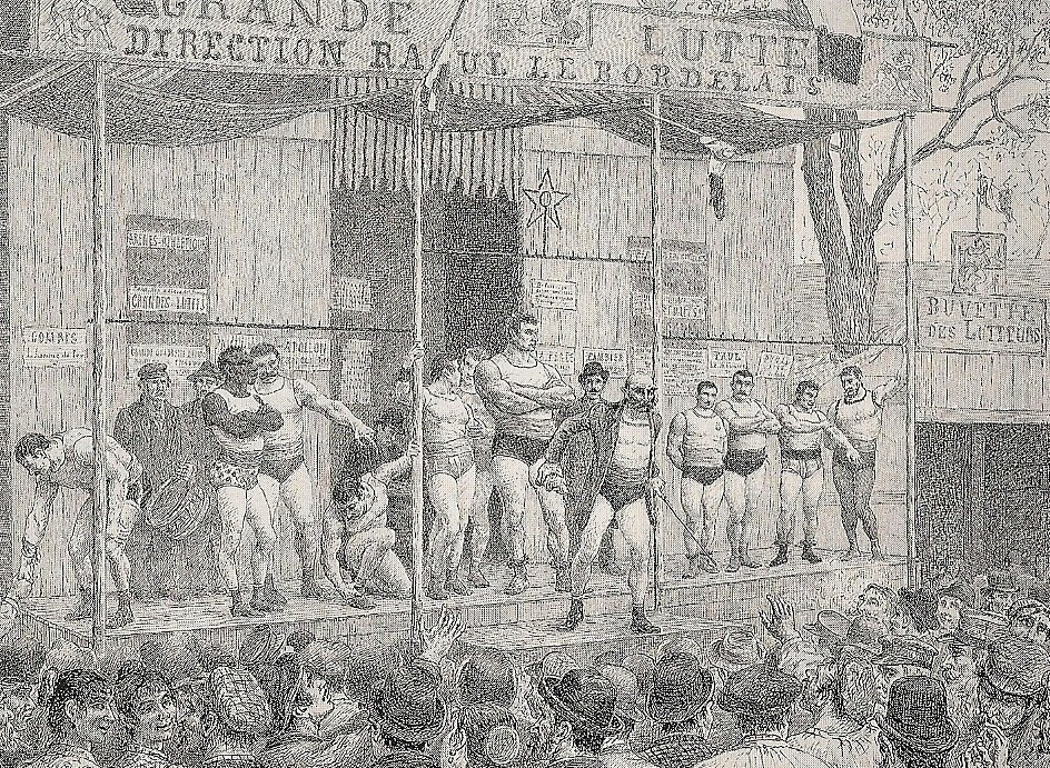 Bordeaux - Raoul le bordelais à la Foire de Quinconces c 1890